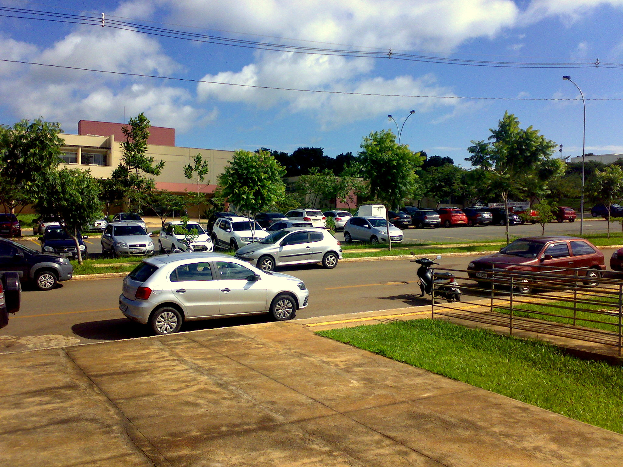 Estacionamento do Instituto de Matemática e Estatística (IME) da Universidade Federal de Goiás. Foto de dezembro de 2016.